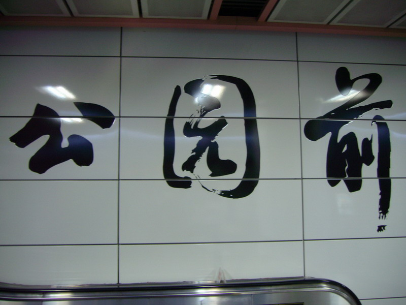 广州地铁公园前站